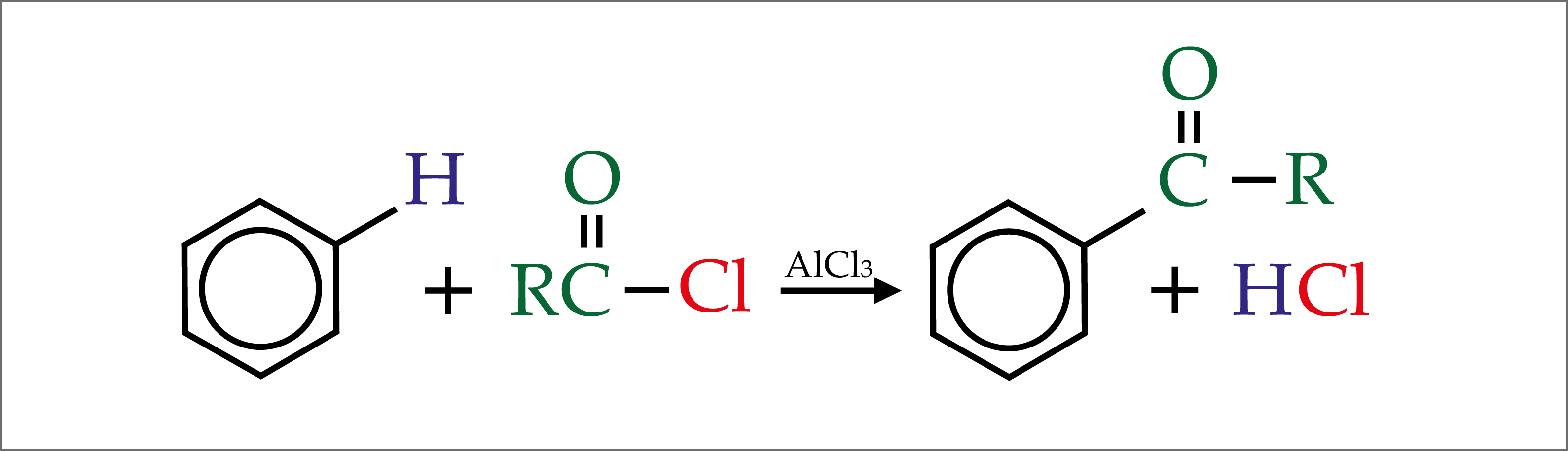 Reação resumida universal do do processo de Acilação de friedel-crafts